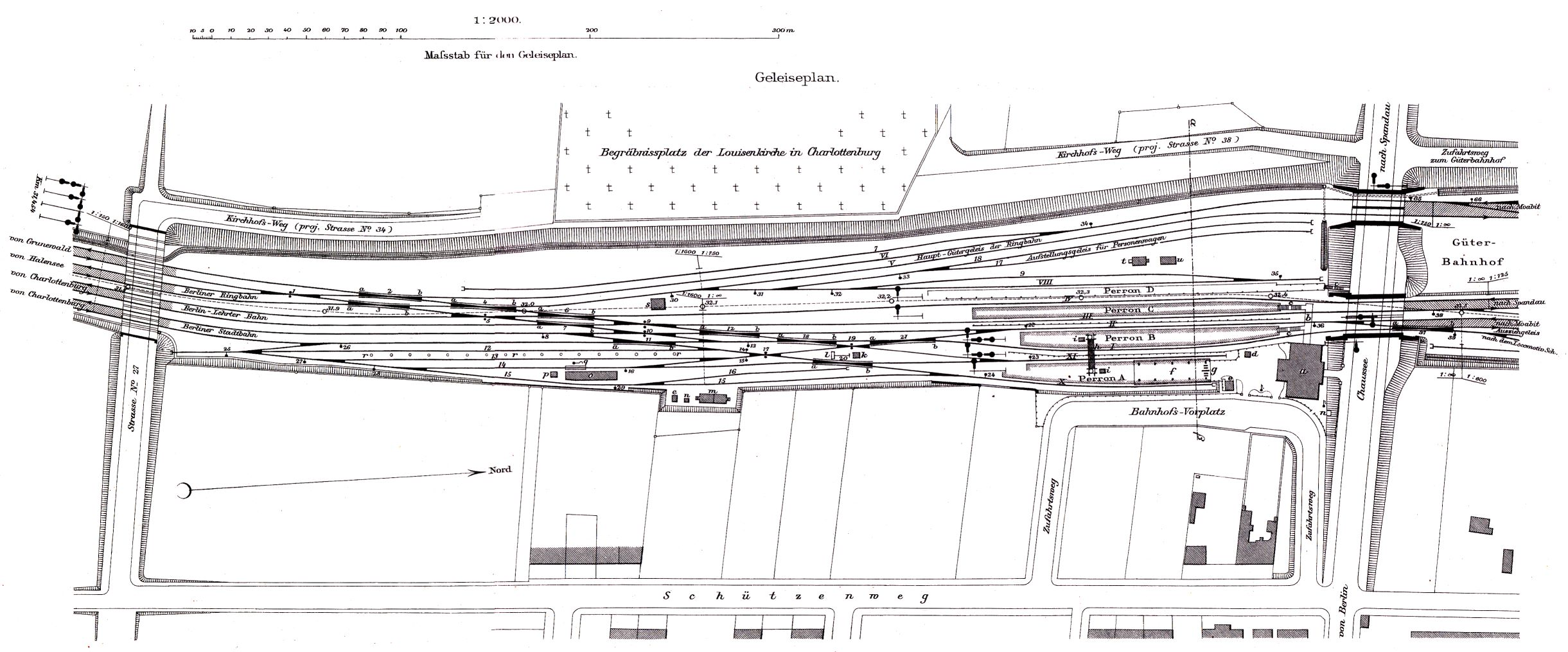 Berlin – Berlin Bahnhof Westend, Gleisplan 1:2000